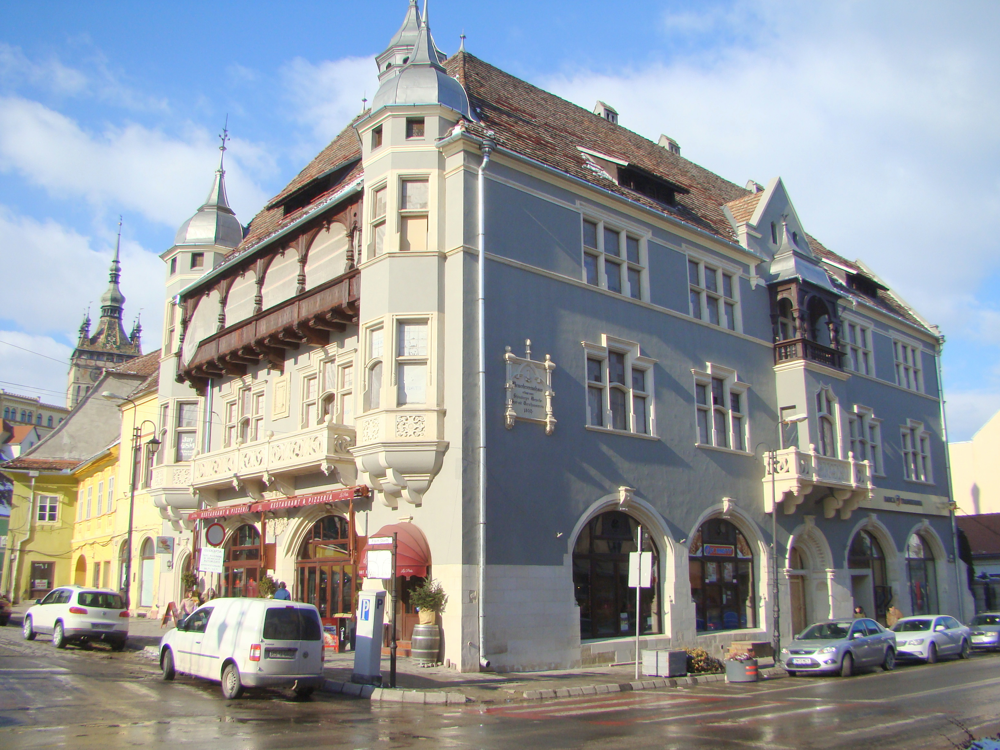 Fostul sediu al asociației breslașilor, azi birouri, spațiu comercial municipiul Sighișoara, Piața Oberth Hermann 15 1898 - 1901